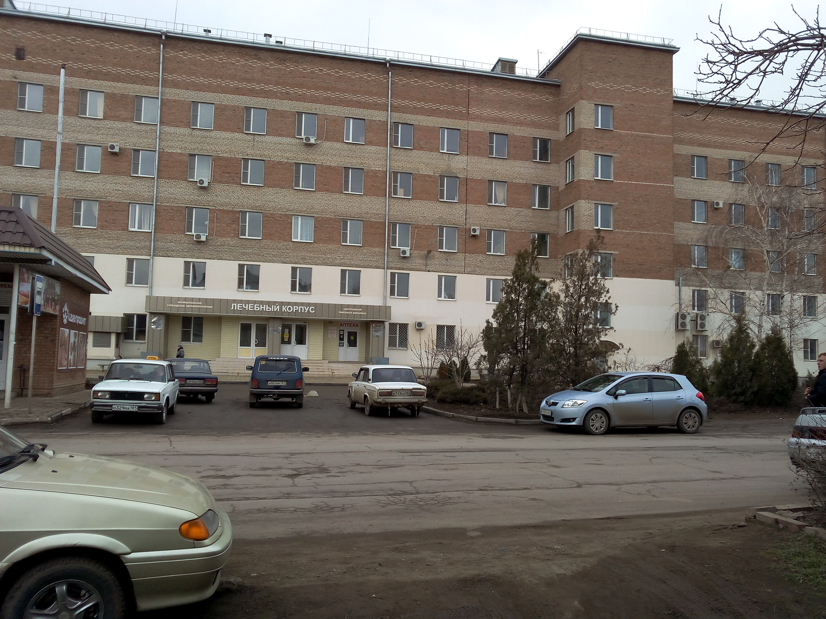 г. Сальск,улица Кузнечная, здание акушерского корпуса (роддома)